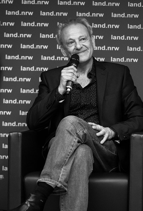 Alfred van Cleef, Düsseldorf 2016, Düsseldorfer Stadttor, "Europa erlesen". Lesung aus "Die verborgene Ordnung. Eine Reise entlang des Nullmeridians" 08.März 2016